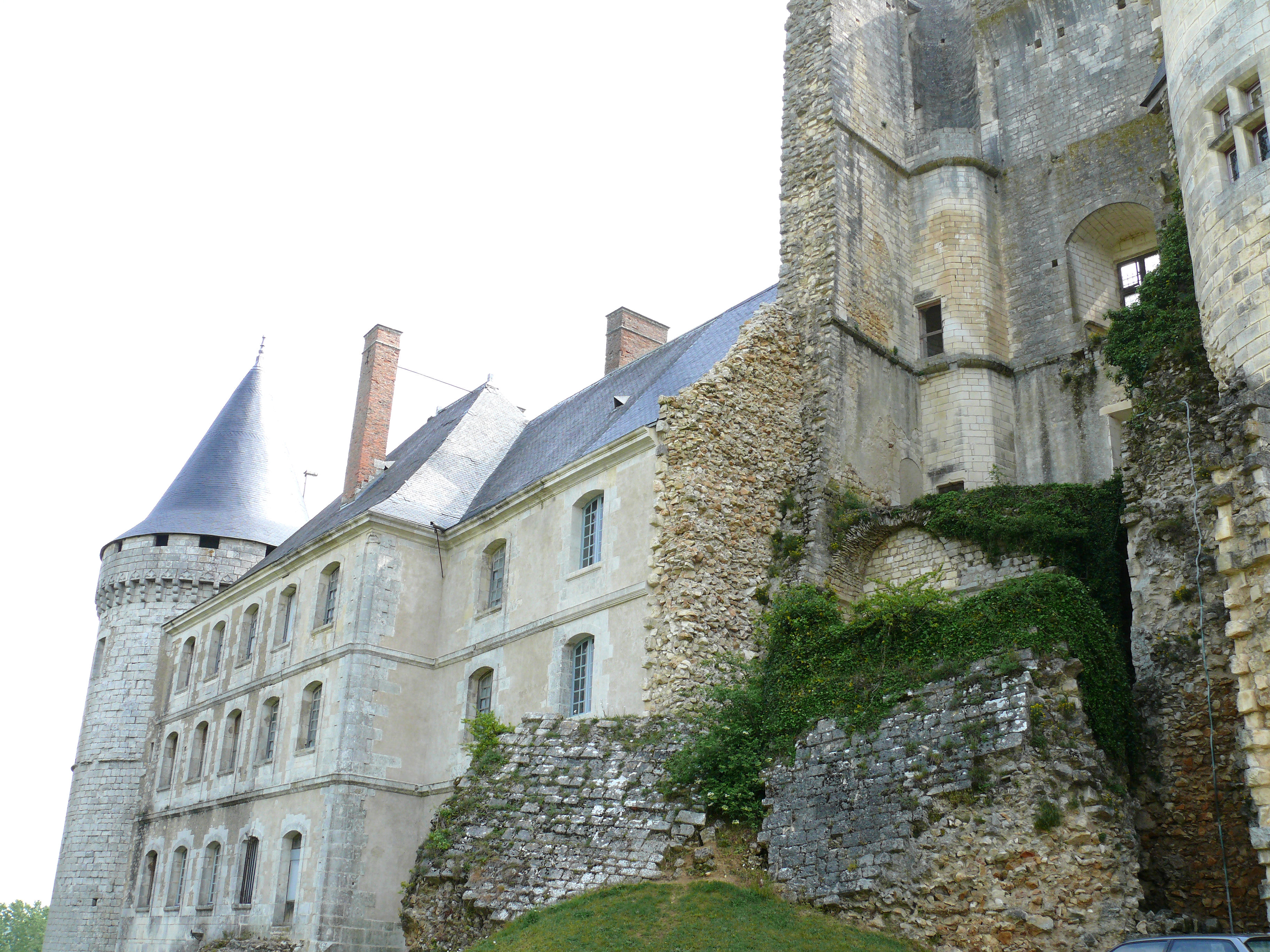 Château de La Rochefoucauld - Aile du XVIIIe siècle, à côté du donjon dont la partie occidentale s'est effondrée